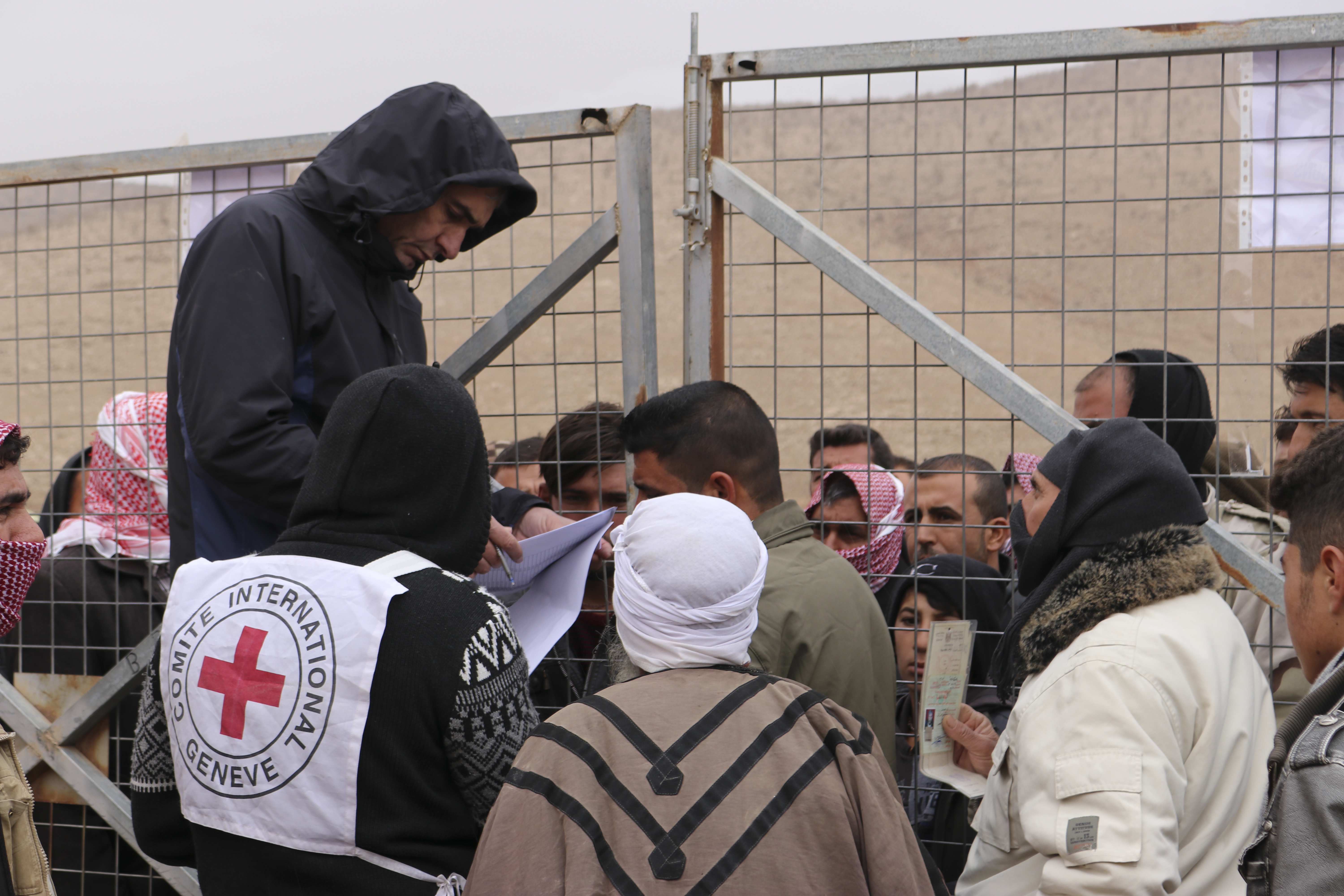 Мешканці табору для біженців отримують грошову допомогу від МКЧХ